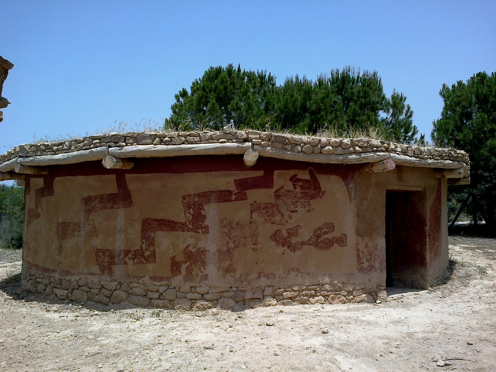 Chypre Lempa Village Chalcolithique